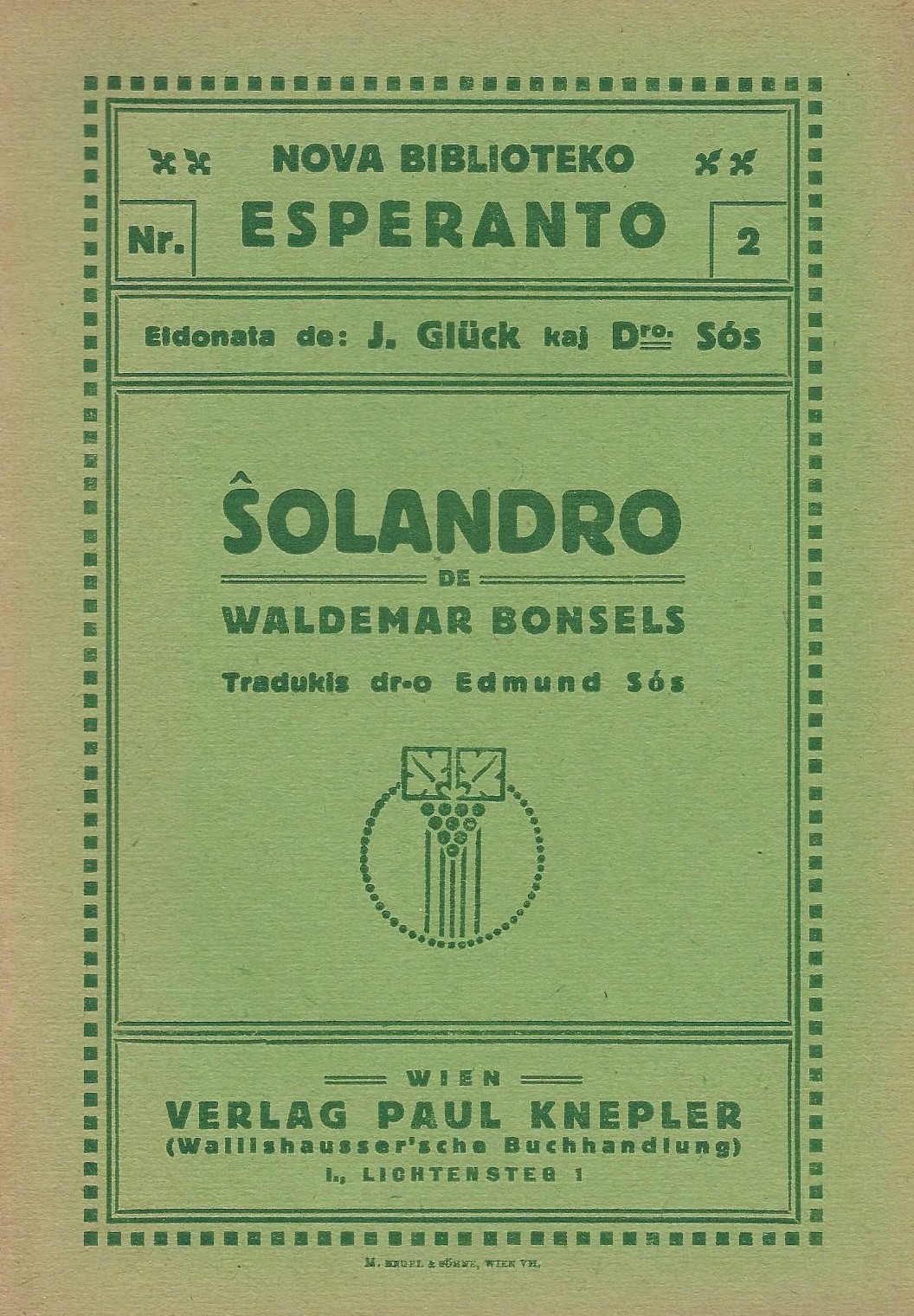 kovrilo de "Ŝolandro", 1924